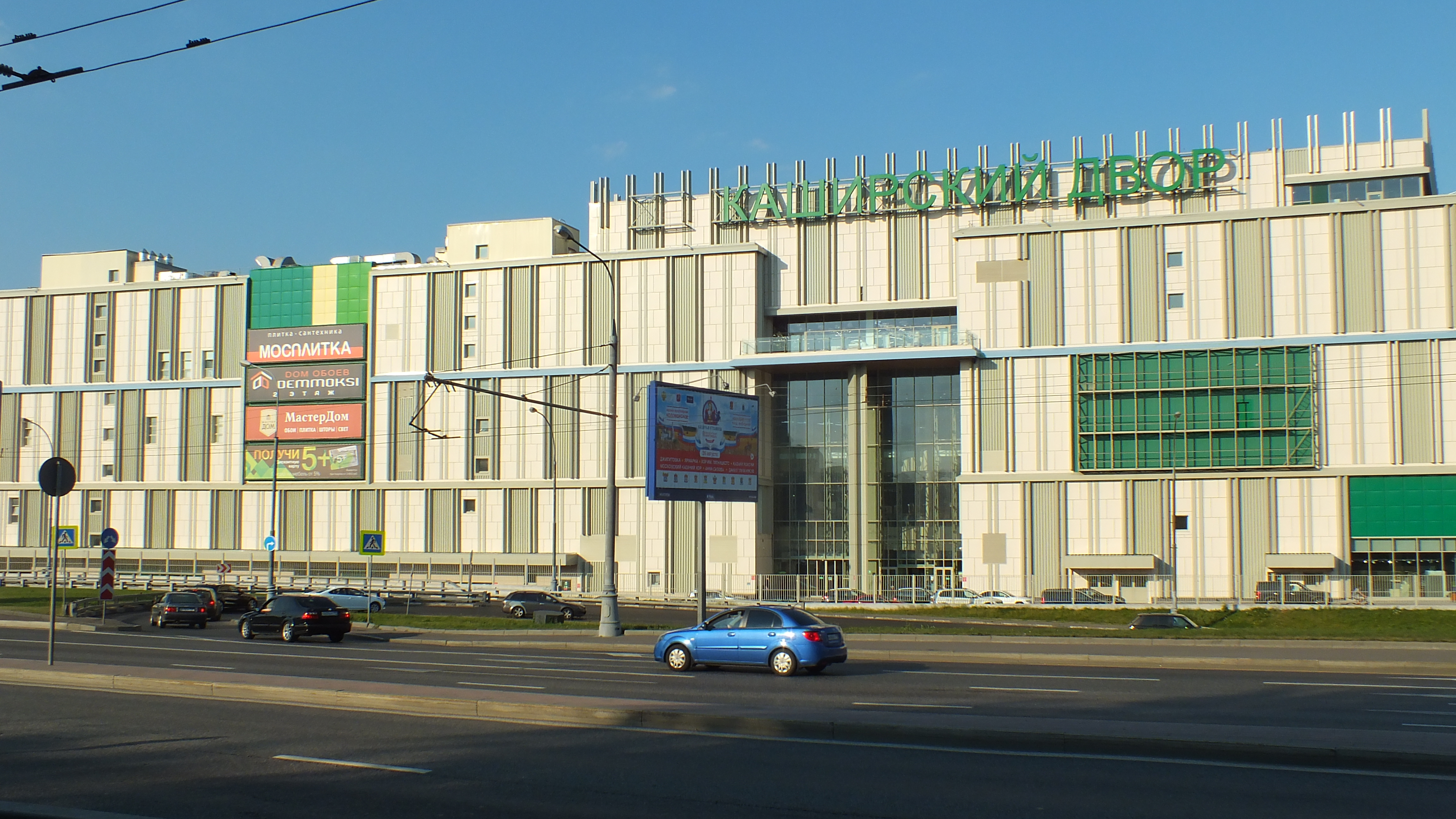 Торгово-строительный комплекс «Каширский двор» на Каширском шоссе в Москве.